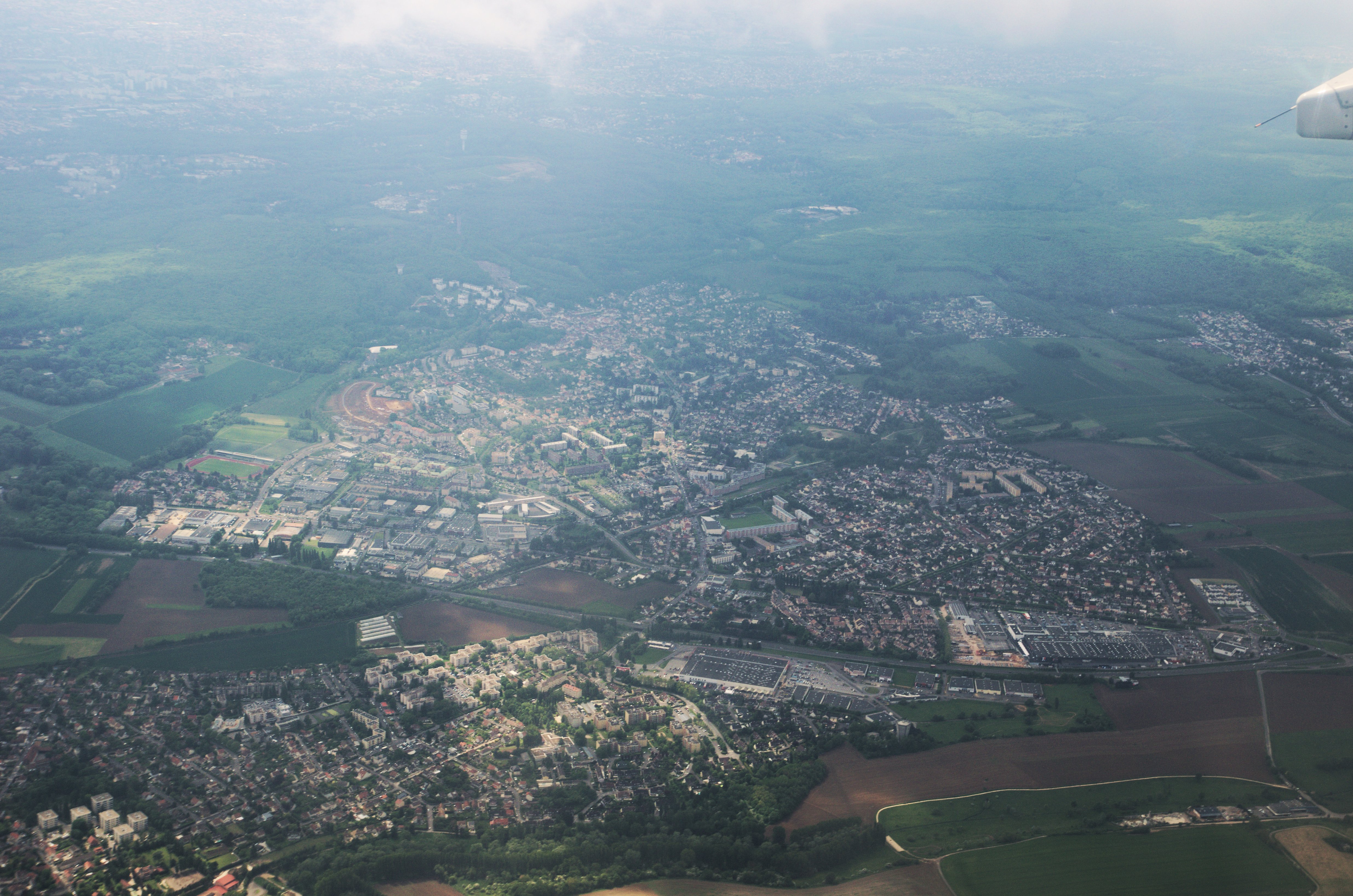 Domont et Ézanville vus d'avion